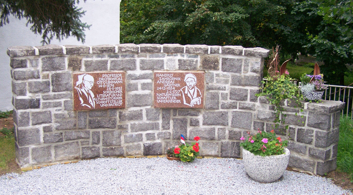 Quatitz, das neu errichtete Denkmal zu Ehren von Andreas Gärtner und Otto Lehmann